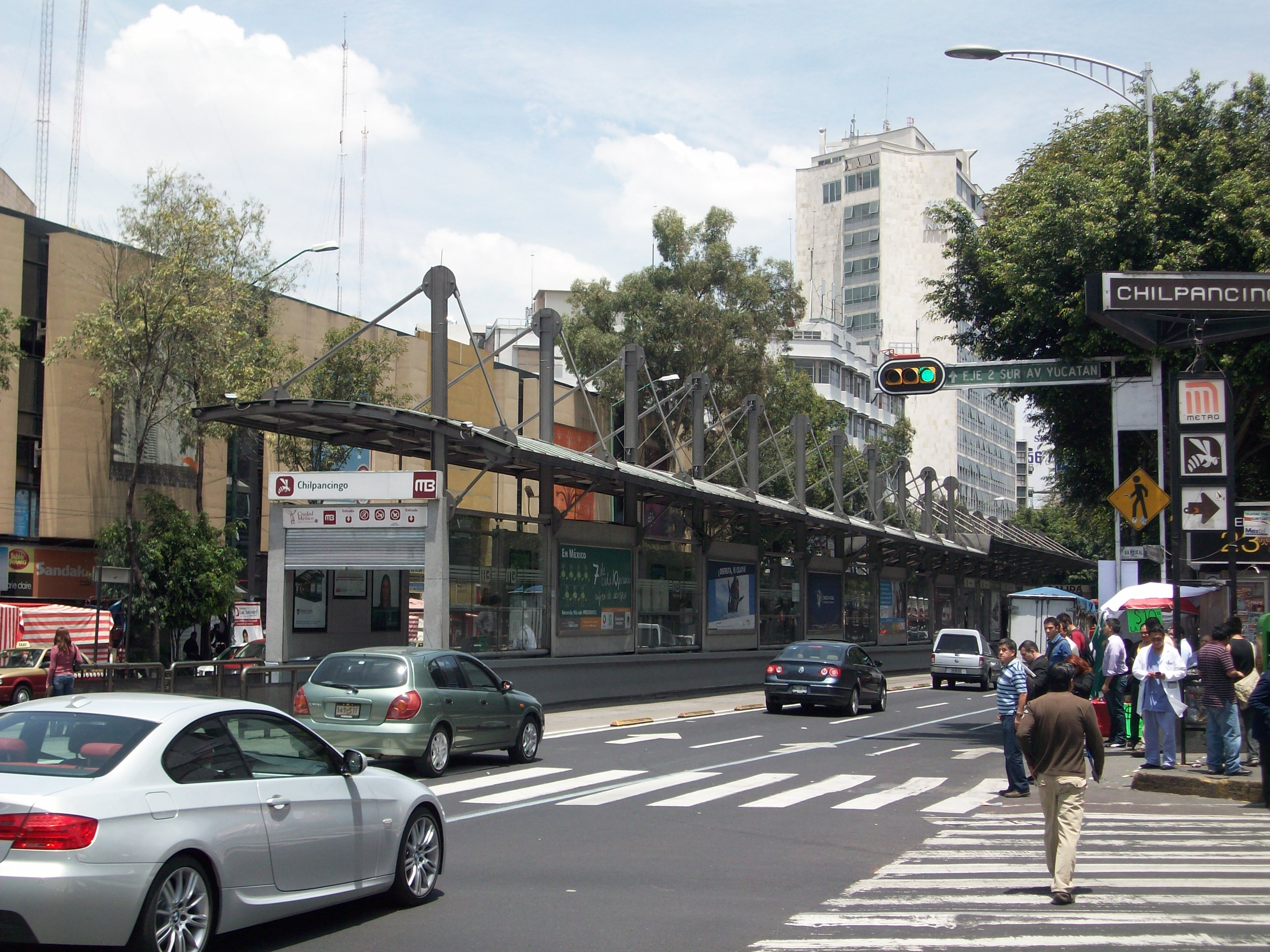 Estacion Cilpancingo